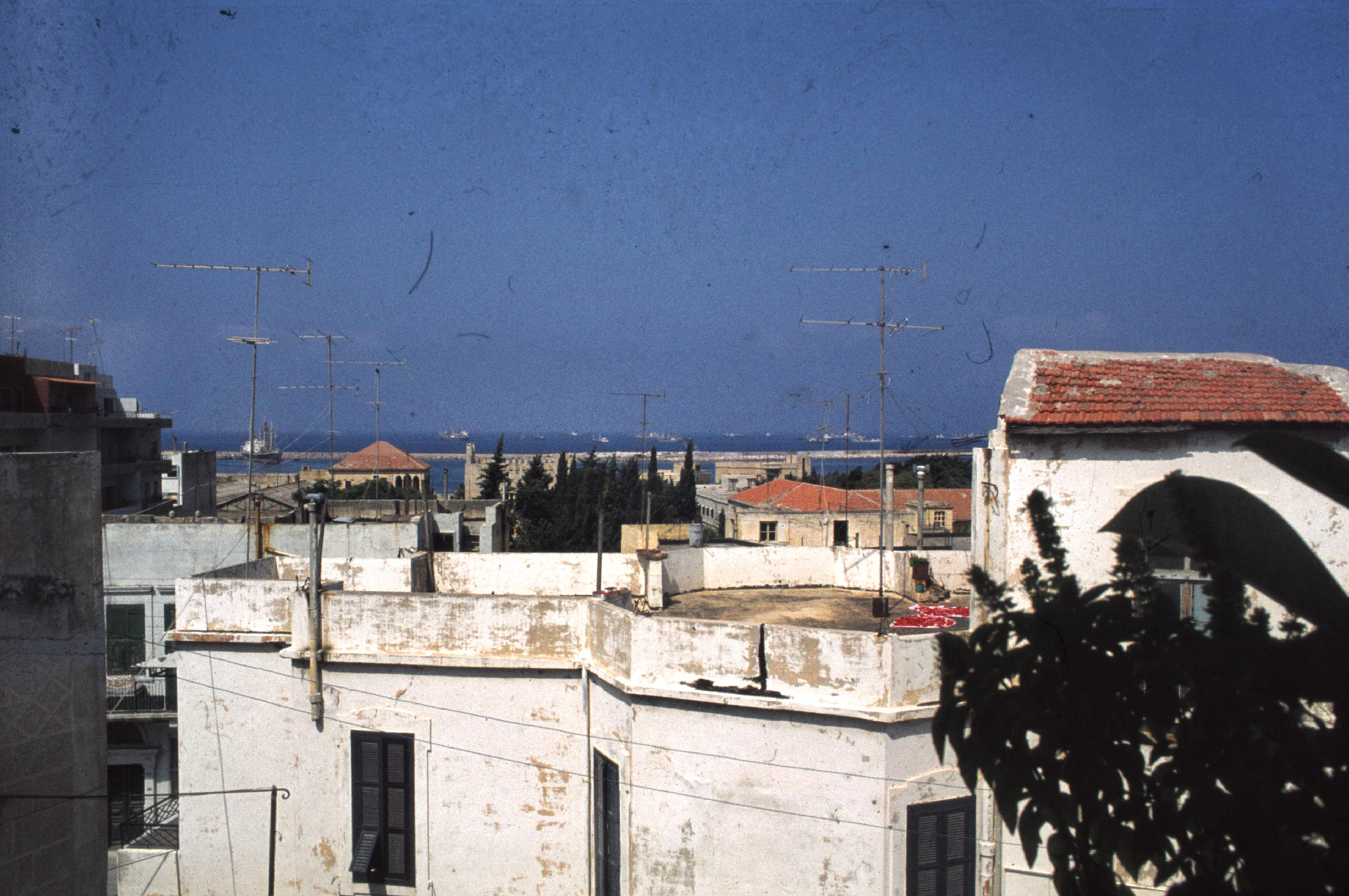 Toits et port de Lattaquié en 1979